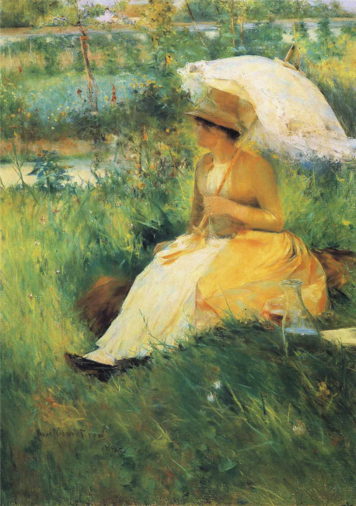 My Wife